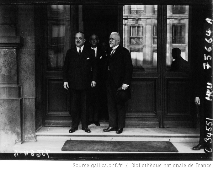 Tardieu junto a Johann Schober, en 1930.